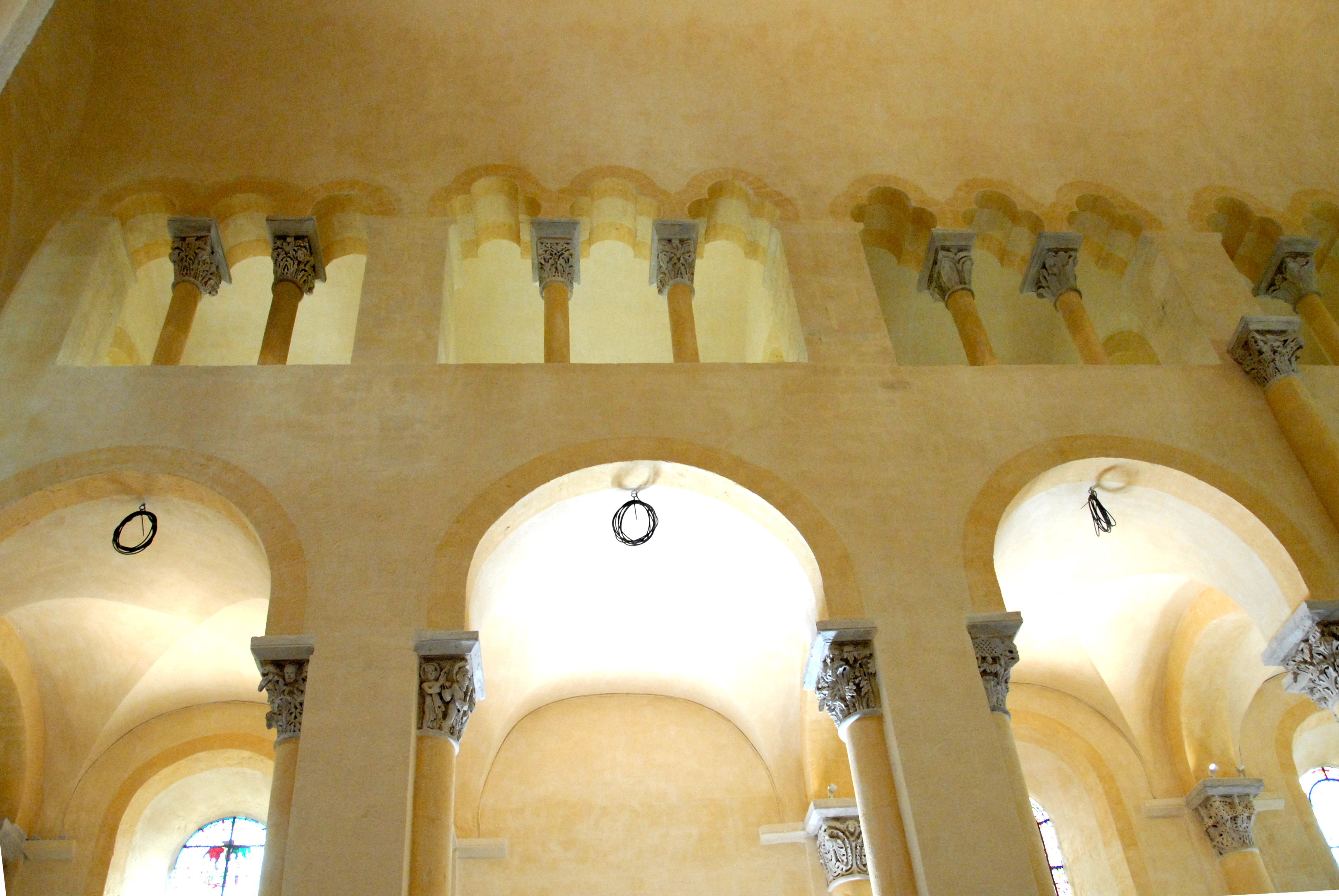 Notre-Dame du Port, Südwand Mittelschiff, 2 Geschosse